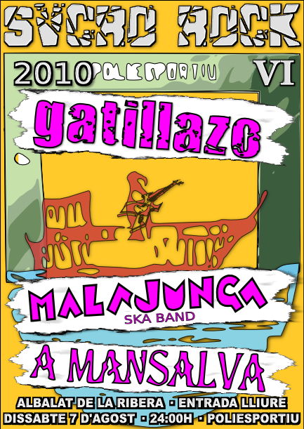 Cartell de la VI edició del Festival Svcro Rock